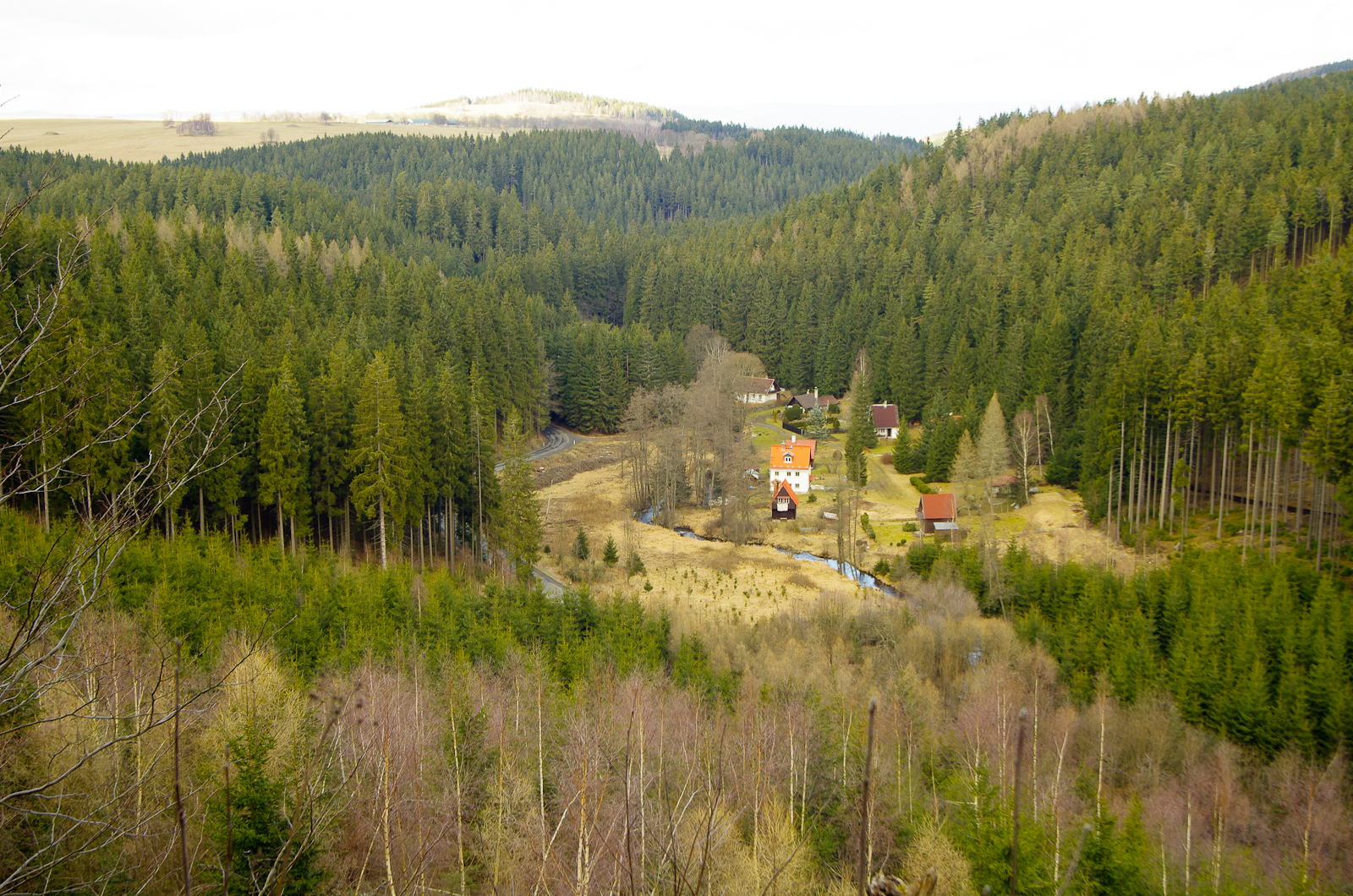 Podstrání, okres Sokolov, pohled z hradu Plikenštejn na chatovou oblast v údolí Lobezského potoka